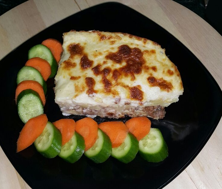 مكرونة بالباشميل بالطريقة المصرية